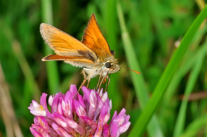 Braunkolbiger Braun-Dickkopffalter